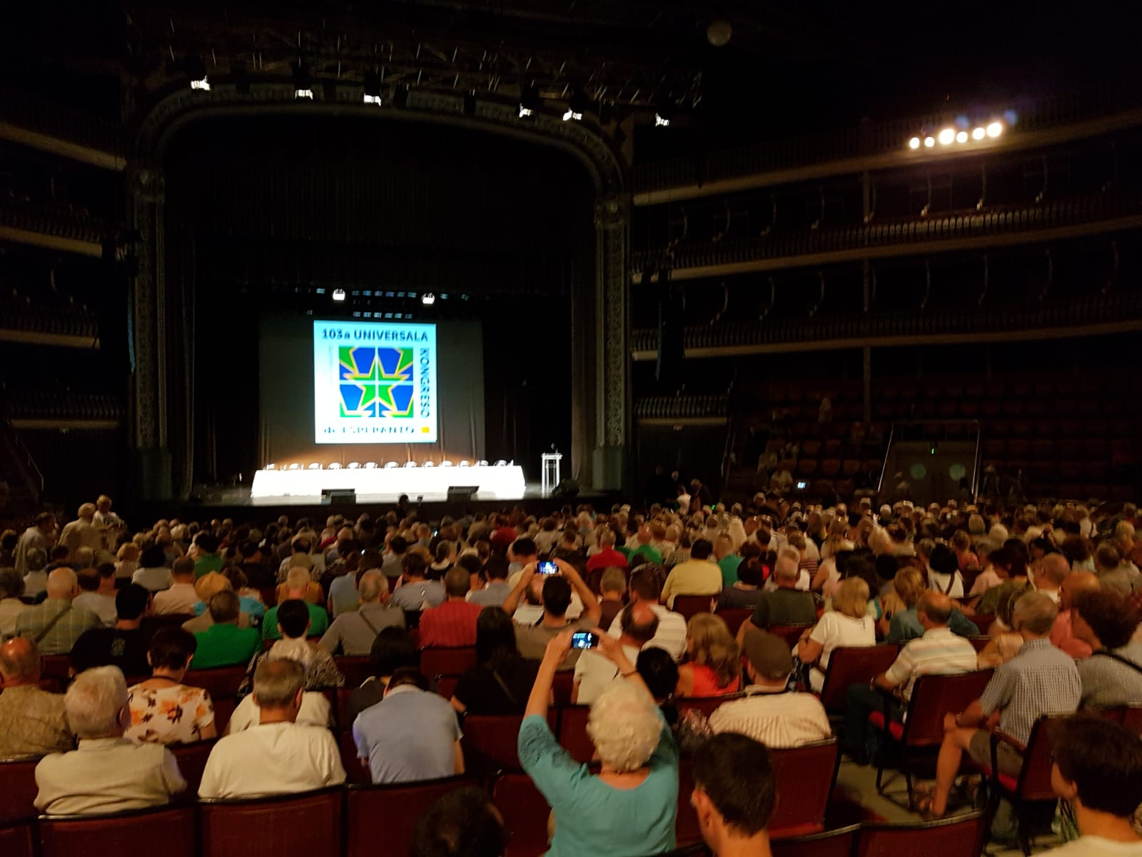 103-a Universala Kongreso de Esperanto